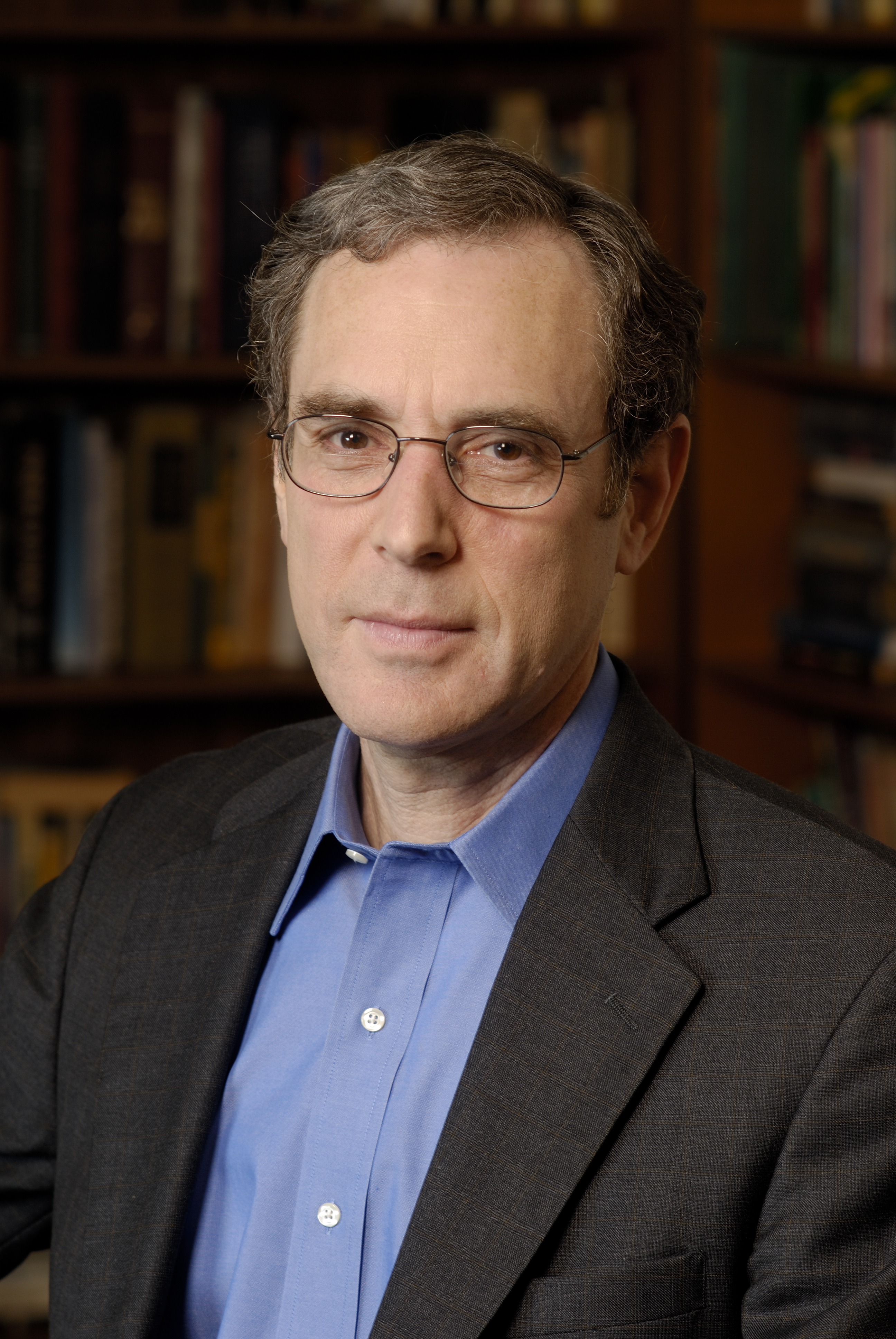 Steven Wax